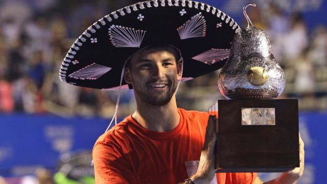 ГРИГОР ДИМИТРОВ-СНИМАНА ОТ ИВО КОСТОВ